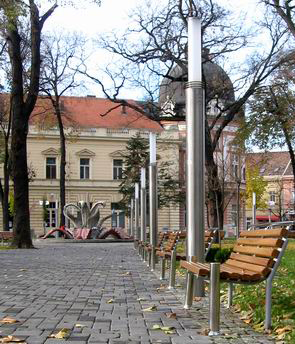 Градски парк у Сремској Митровици. Овај парк је смештен у самом центру Сремске Митровице и посебно је интересантен туристима. Парк је окружен грађевинама из доба аустроугарске владавине у којима су смештени градско позориште, библиотека, музеј, а у непосредној близини је и хотел Сирмијум поред кога је велика отворена римска ископина. Парк је реновиран 2006. године.